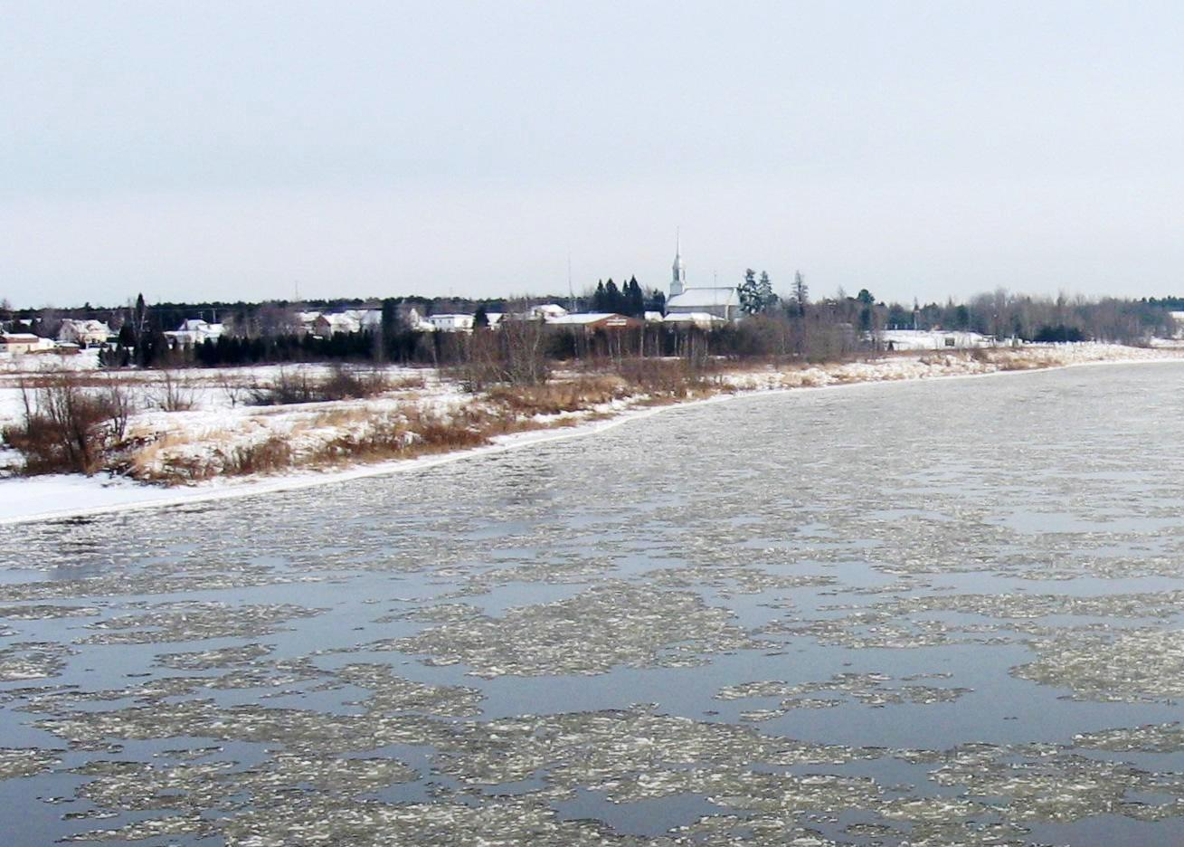 Vue du village de Notre-Dame-de-Lourdes à partir du pont sur la rivière Bécancour. On voit le frazil qui lentement glisse sur l'eau avant de former la glace.